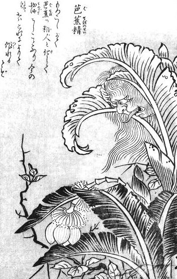 Bashōnosei (芭蕉精) from the Konjaku Hyakki Shūi (今昔百鬼拾遺)